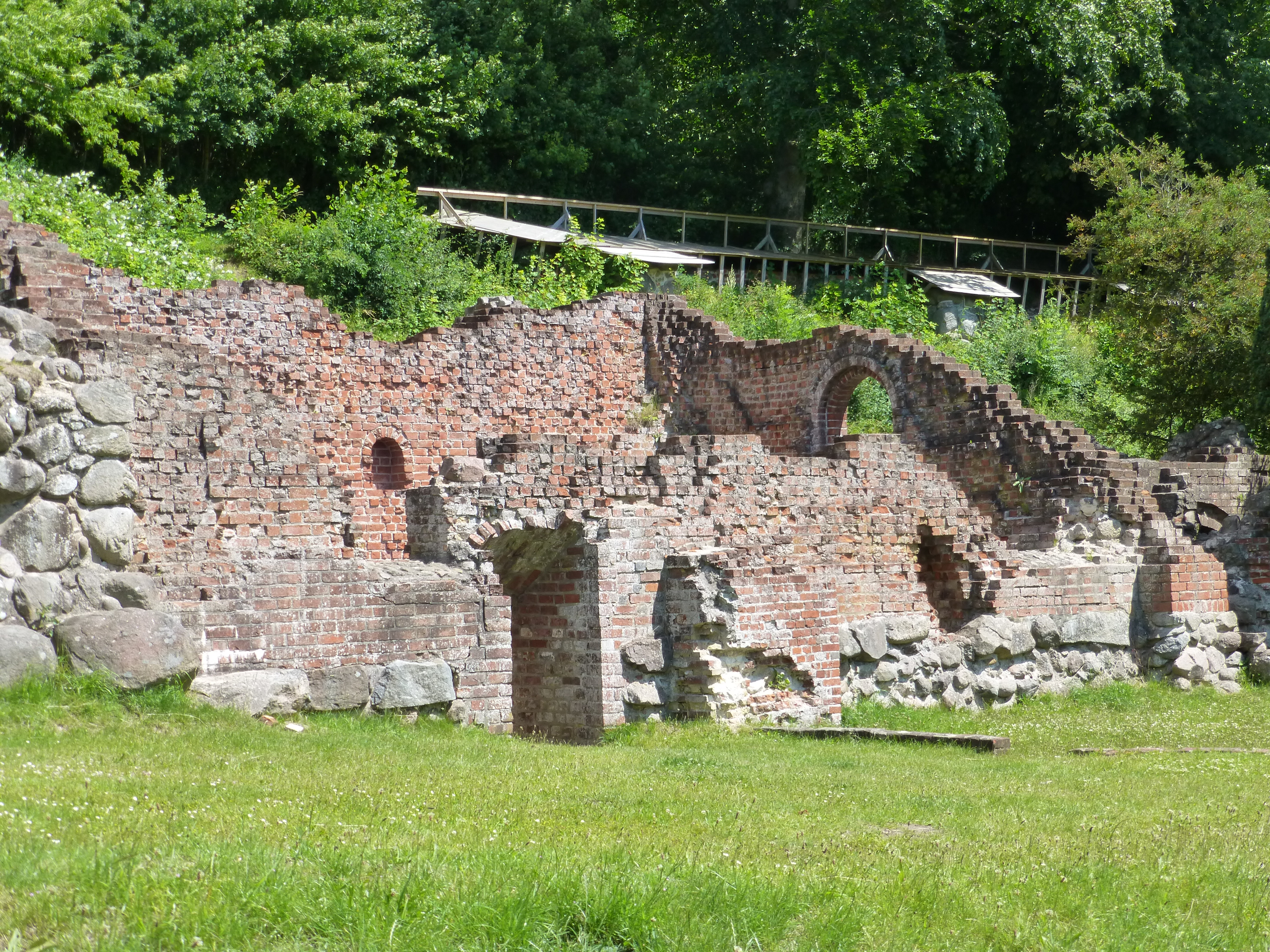 Ruinerne 2012